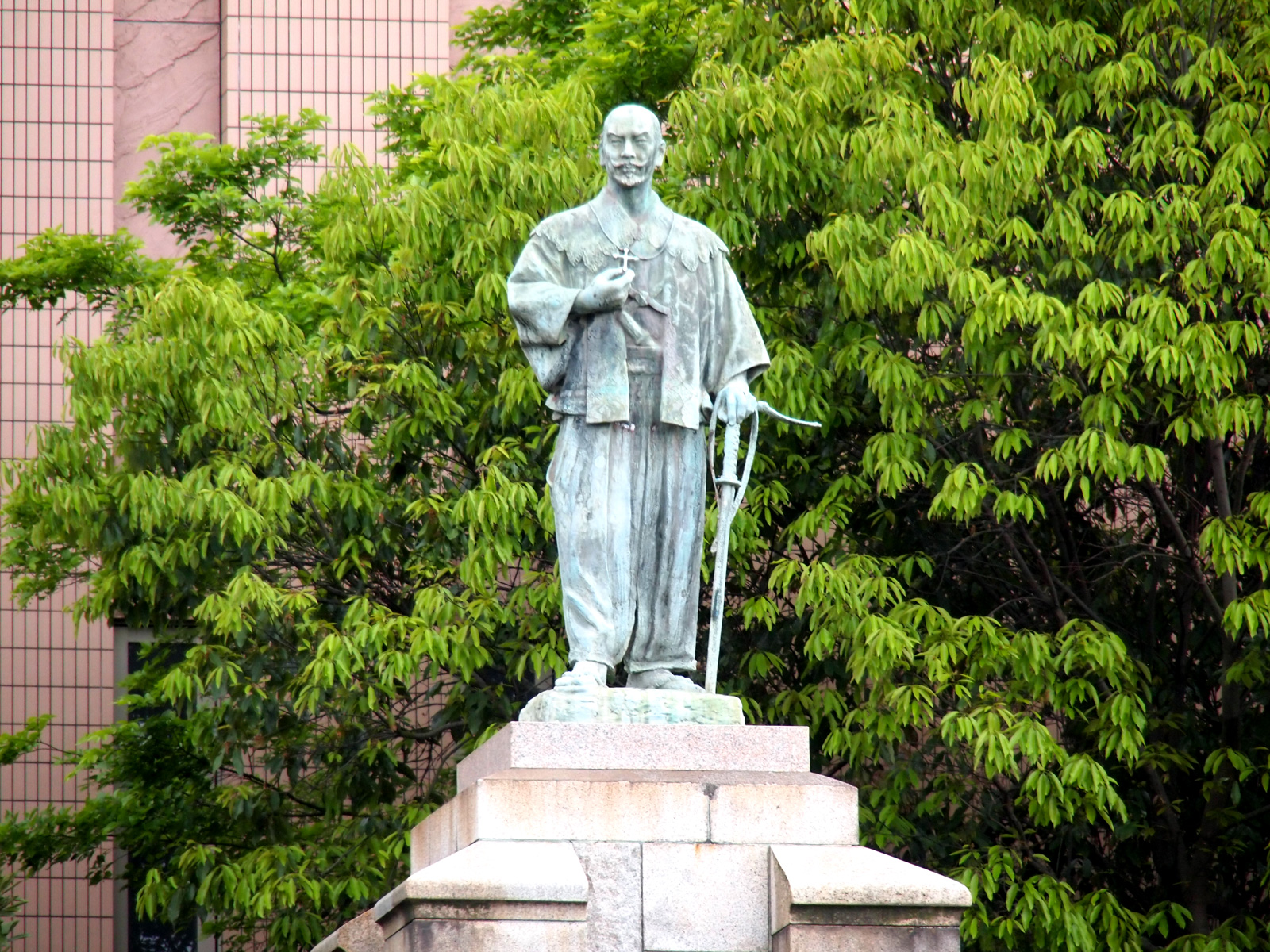 大友宗麟像（大分県大分市神宮寺浦公園）